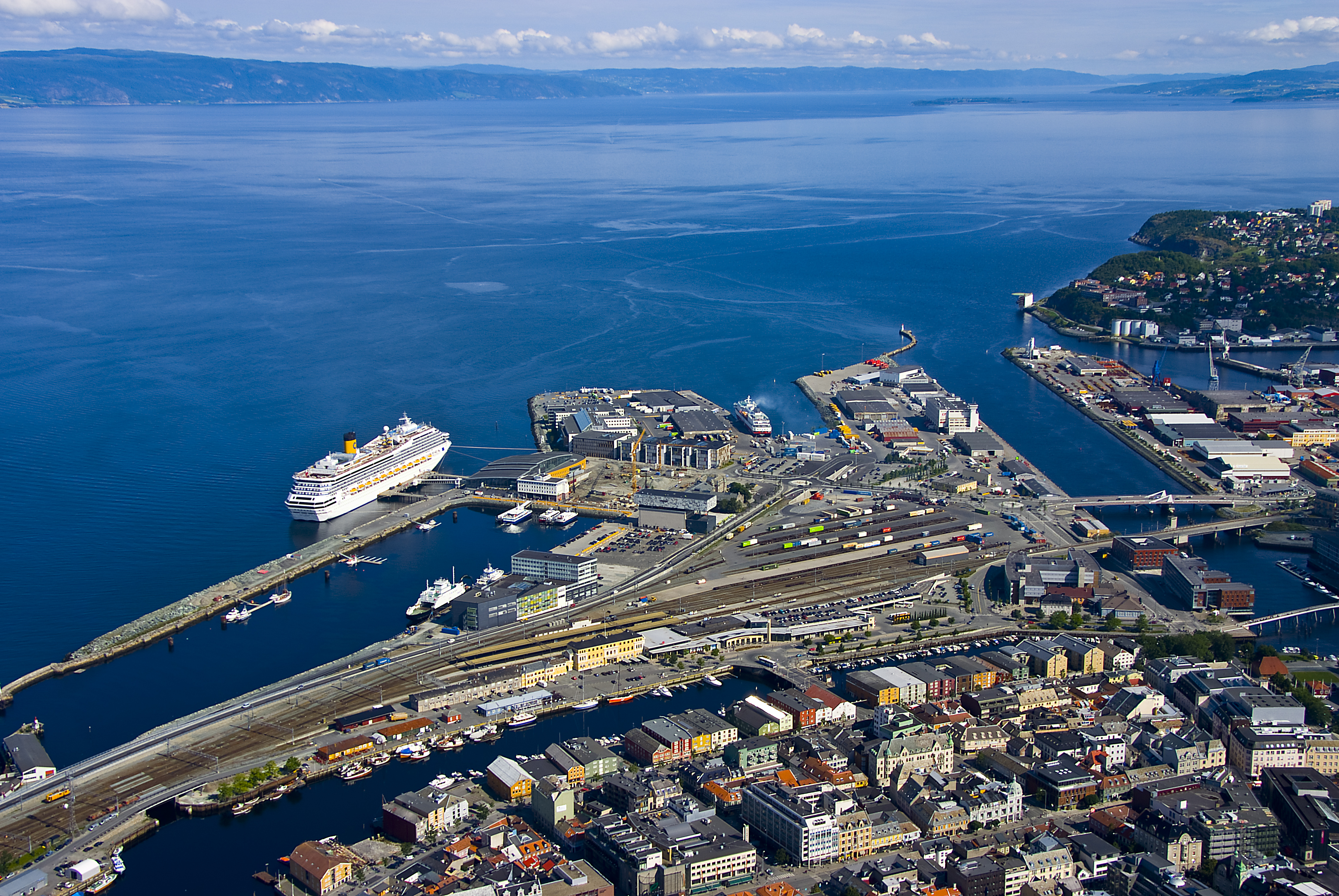 Foto: Trondheim Havn/Åge Hojem